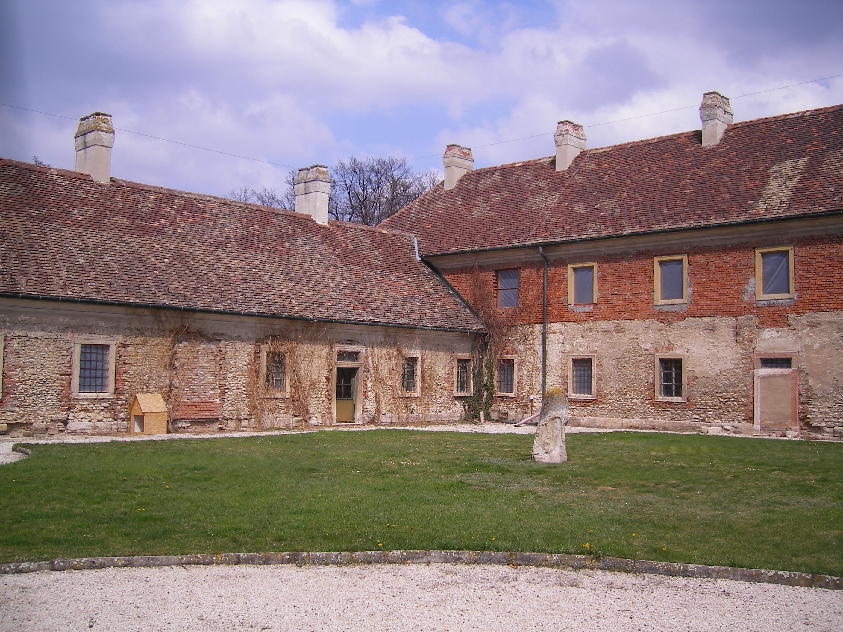 Oroszlány - majkpusztai kamalduli apátság